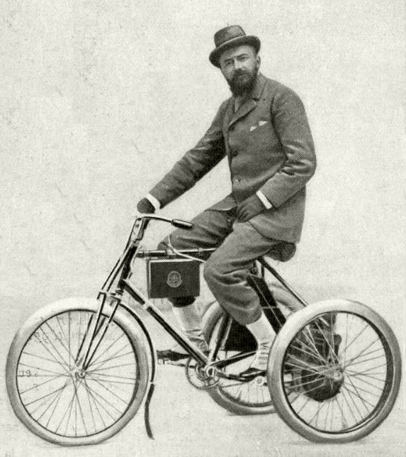 André Michelin sur son tricycle à pétrole - La Vie au Grand Air du 18 octobre 1913, p.860